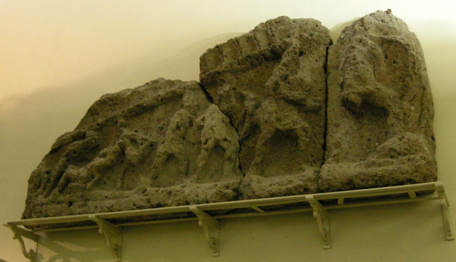 Frammento etrusco di frontone da Norchia, IV-III sec. AC, esposto al Museo archeologico di Firenze.